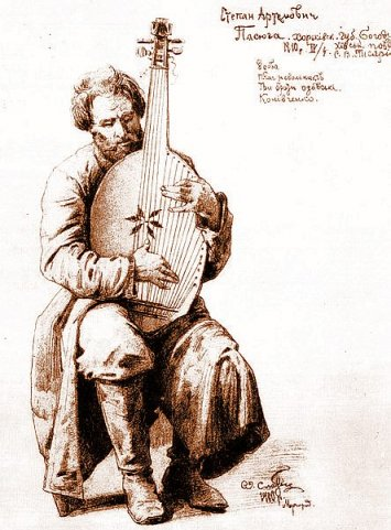 Kobzar Stepan Pasiuha. A drawing by Opanas Slastion.